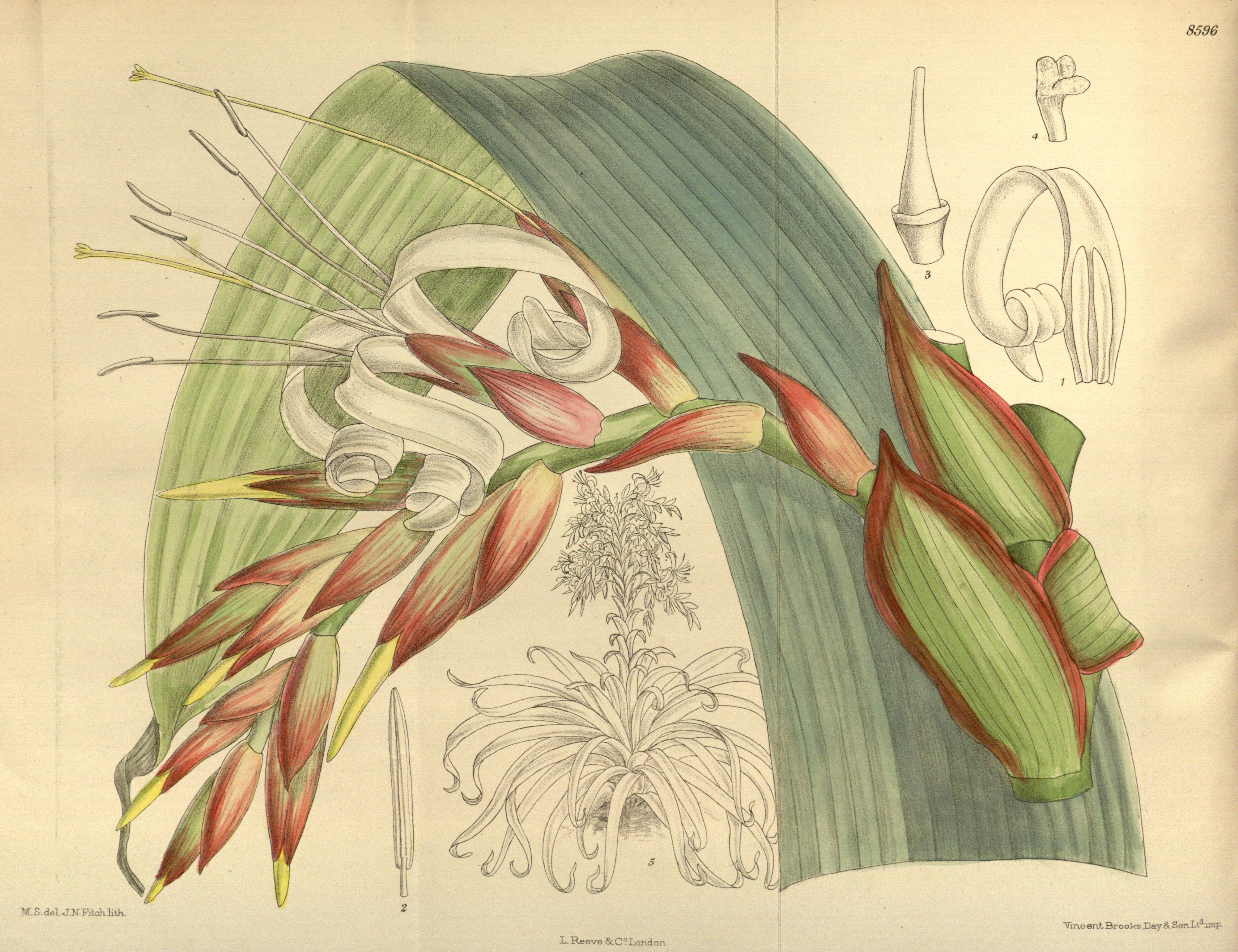 Tillandsia regina, Bromeliaceae